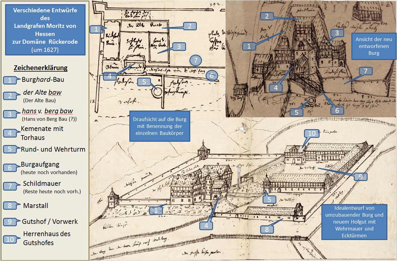 Verschiedene Darstellungen/ Entwürfe des hessischen Landgrafen Moritz im Jahre 1627 von Gutshof und Burg Rückerode als gemeinsamer Komplex und Wittum für seine Frau Juliane von Nassau mit Erläuterungen der bekannten Gebäude. Der Entwurf wurde nur in Teilen im Gutshof umgesetzt. Die sehr sorgfältig ausgeführten Entwürfe in der für die Zeichnungen des Landgrafen charakteristischen Vogelschau mit hoher Horizontlinie verdeutlichen die Idee des Fürsten, dem Gebäudekomplex eine regularisierte Form sowie eine Sicherung durch Wehrmauer mit vorspringenden Ecktürmen zu geben. In erhöhter Position dargestellt ist auch der alte Baubestand der als Herrenhaus genutzten Burg mit der steinernen Kemenate und den darum gruppierten Fachwerkbauten. Die sorgfältige Dokumentation dieser Gebäude in den verschiedenen Entwürfen lässt darauf schließen, dass sie zu diesem Zeitpunkt noch gut erhalten waren und für eine weitere Nutzung vorgesehen waren.